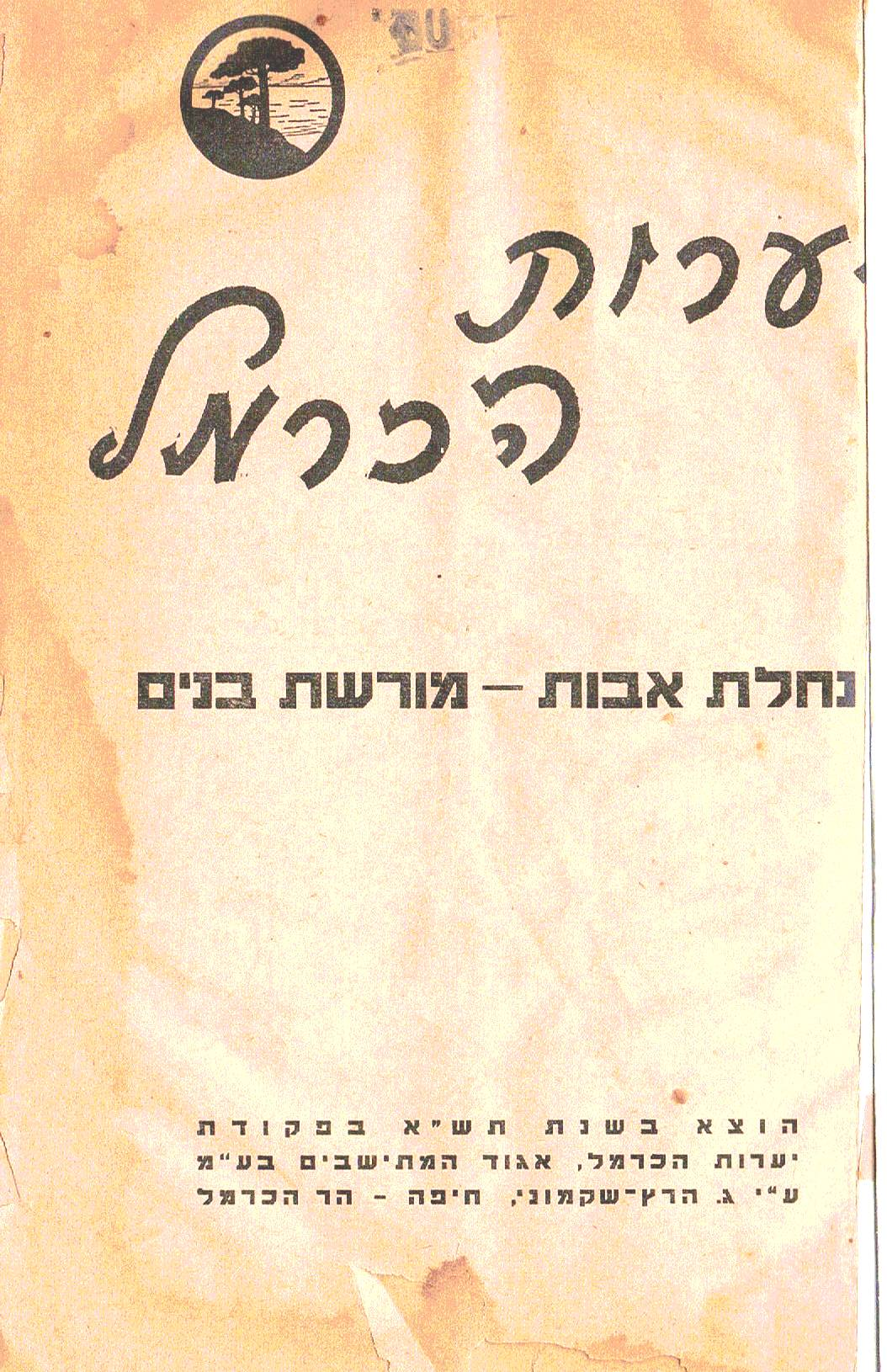 Yaarot Hacarmel Settlers Assocatoin Ltd brochure חוברת הפרסום של תכנית יערות הכרמל להקמת יישוב בהר הכרמל באזור חוות משמר הכרמל, גבעת וולפסון קיבוץ בית אורן של היום. פעילות שהחלה בשנות השלושים של המאה העשרים. החוברת כללה פרסום בעברית ובגרמנית